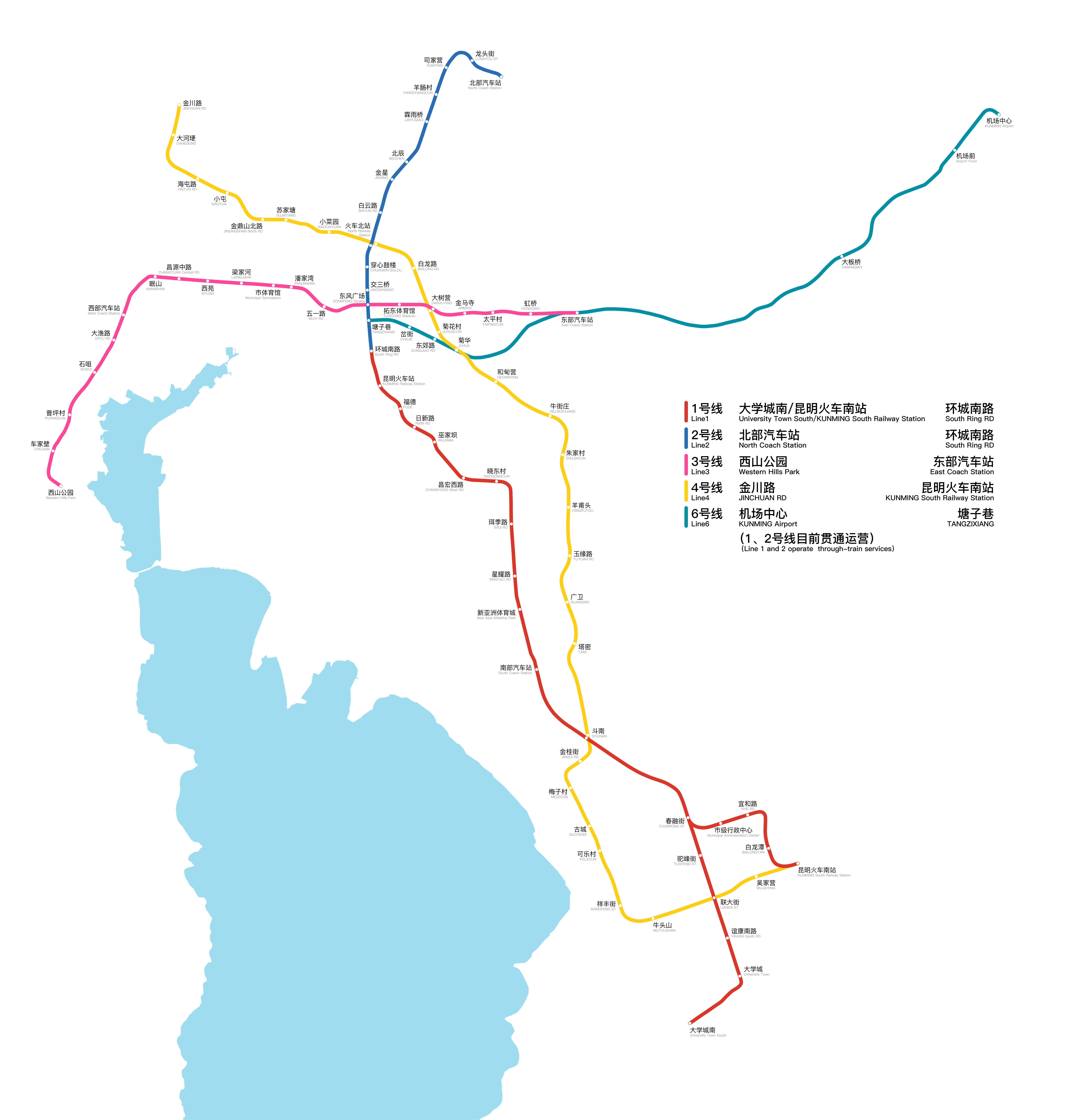 昆明地铁运营线路图，更新于2018年6月